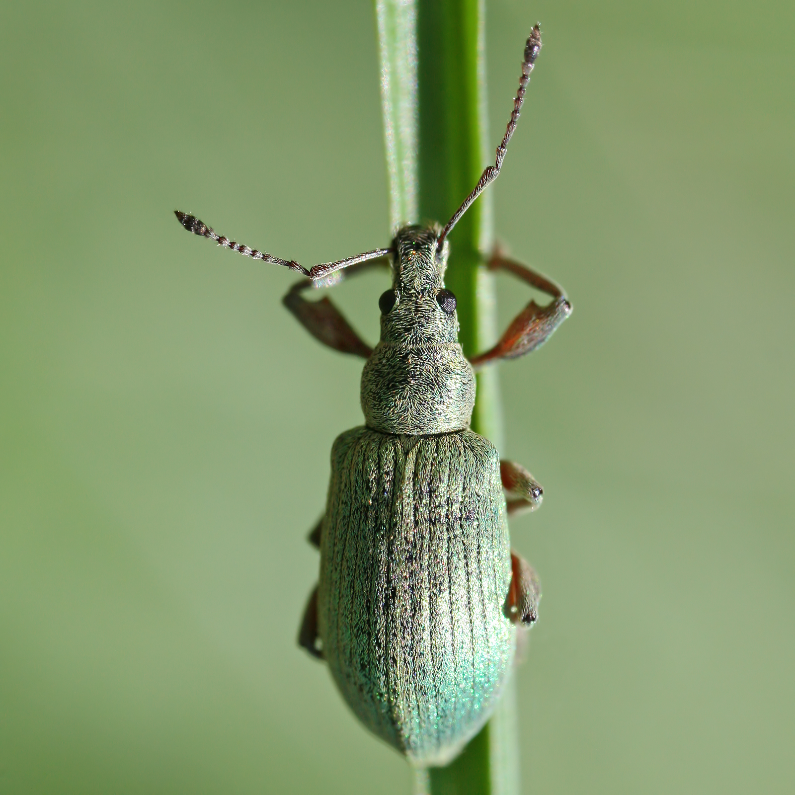 Silberner Grünrüssler (Phyllobius calcaratus)